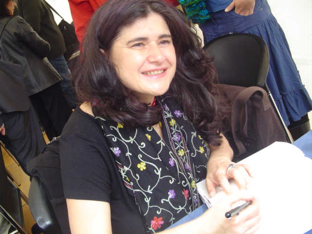 Lucía Etxebarría firmando libros en Barcelona.